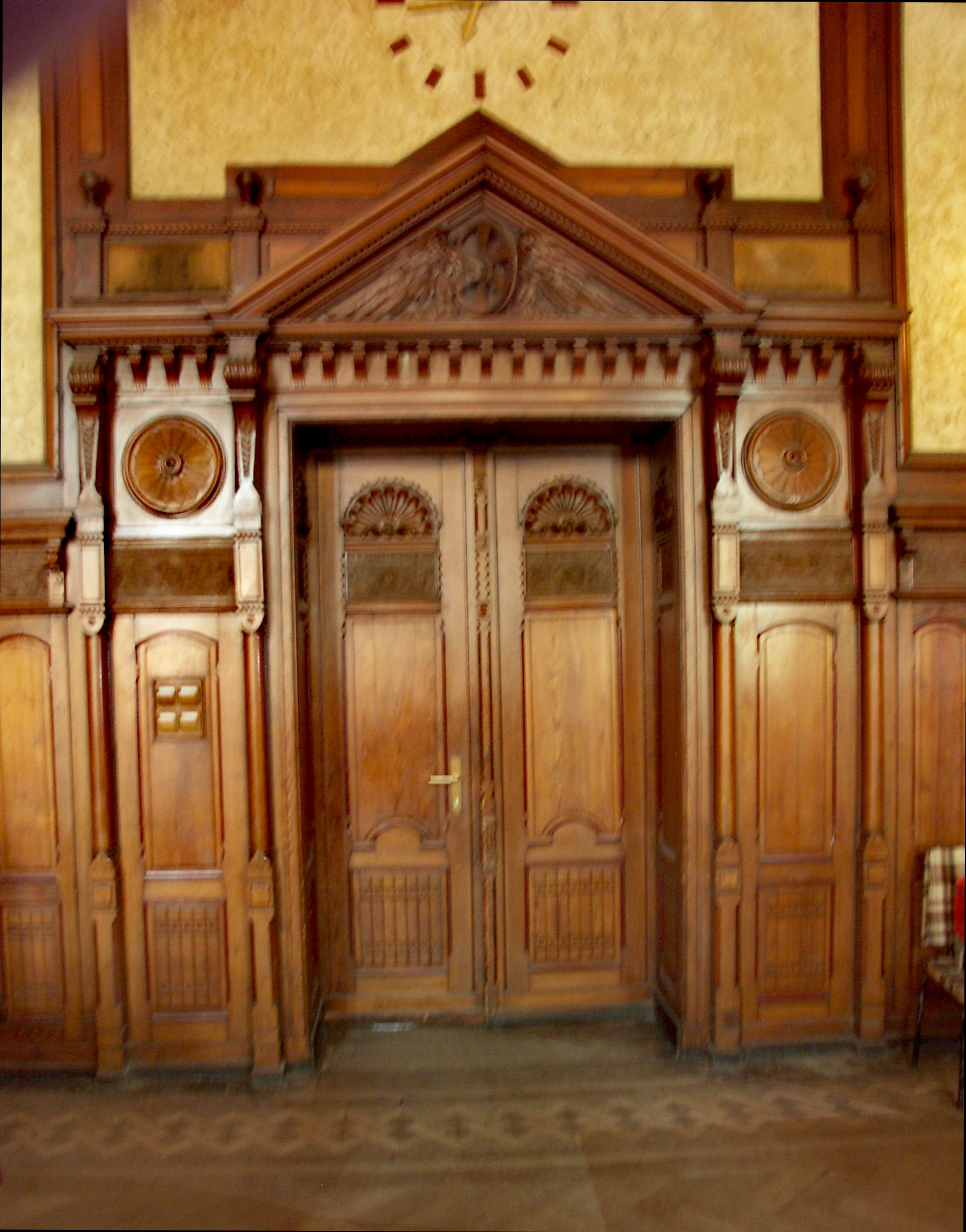 Tür Großer Sitzungssaal, Rbd